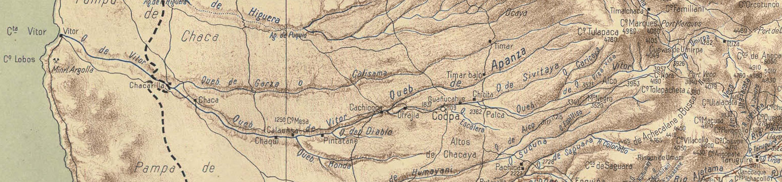 Cuenca de la quebrada de Vitor